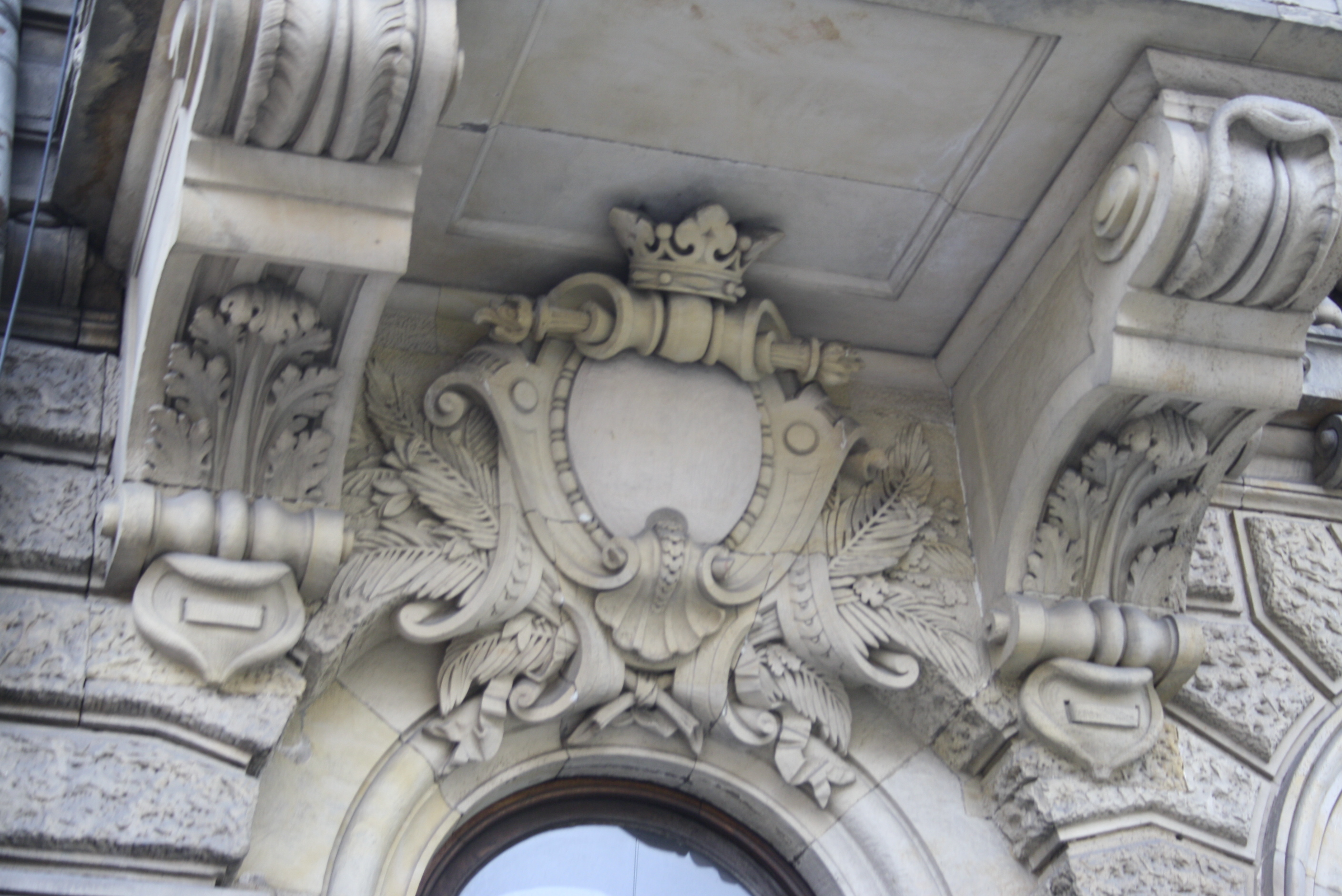 Особняк Кельха А. Ф. (Александрова И. М.) с дворовыми флигелями (Санкт-Петербург и Лен.область, Санкт-Петербург, Чайковского улица, 28)